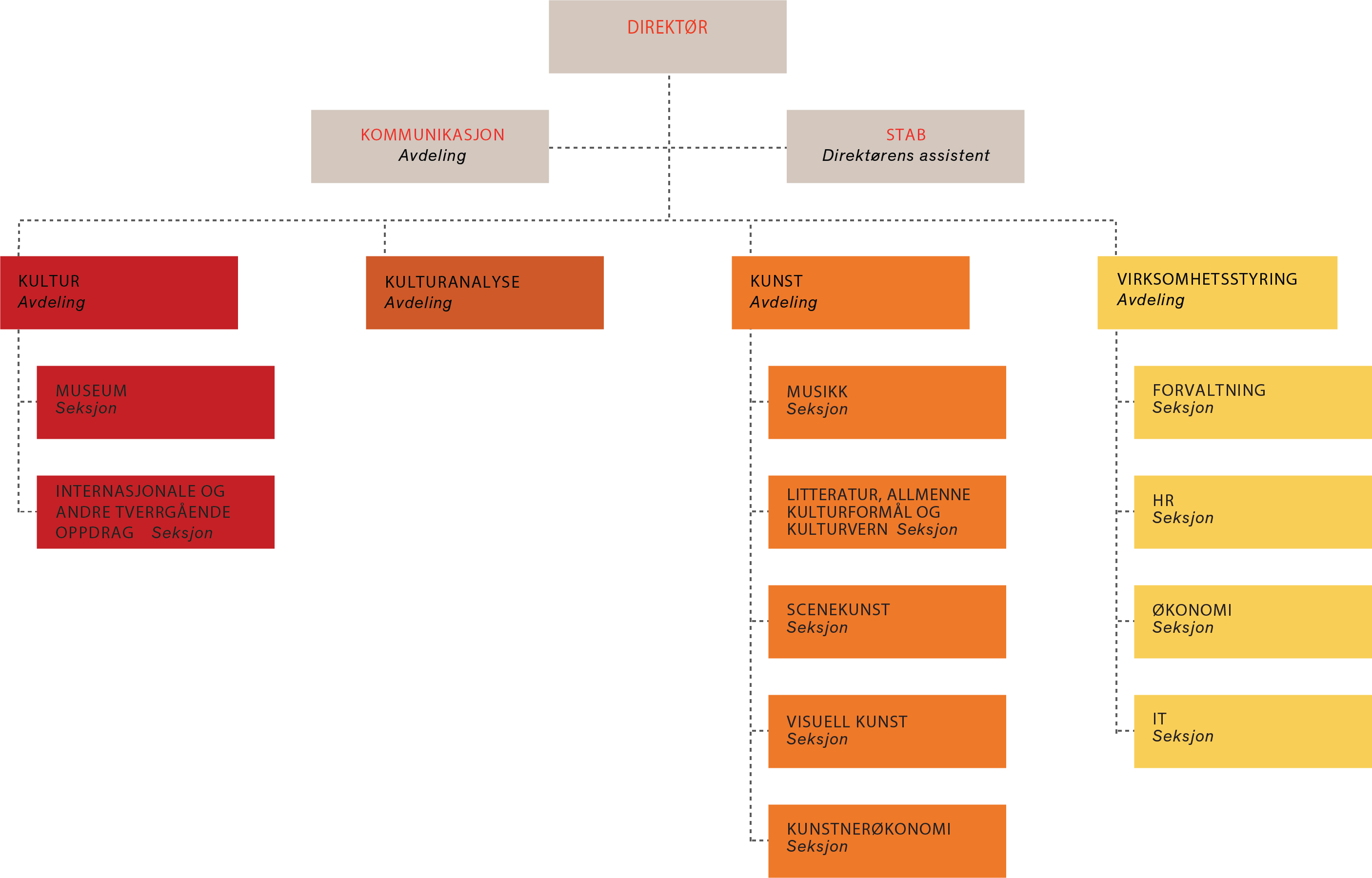 Organisasjonskart for Kulturrådets administrasjon, 2020